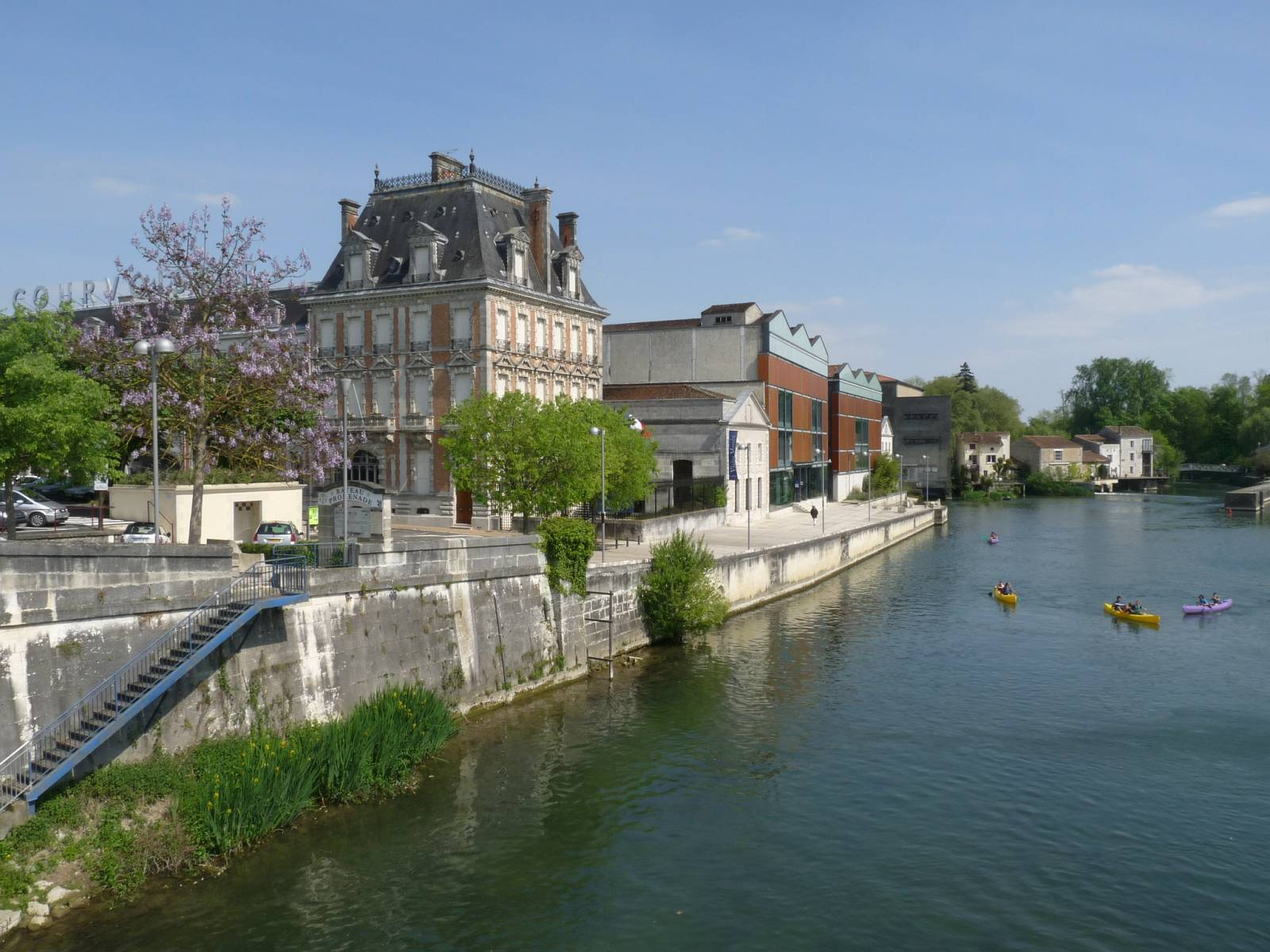 Jarnac, Charente, France; le Charente vue vers l'amont depuis le pont